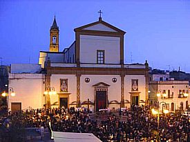 Chiesa Madre, Ribera, Agrigento, Sicilia